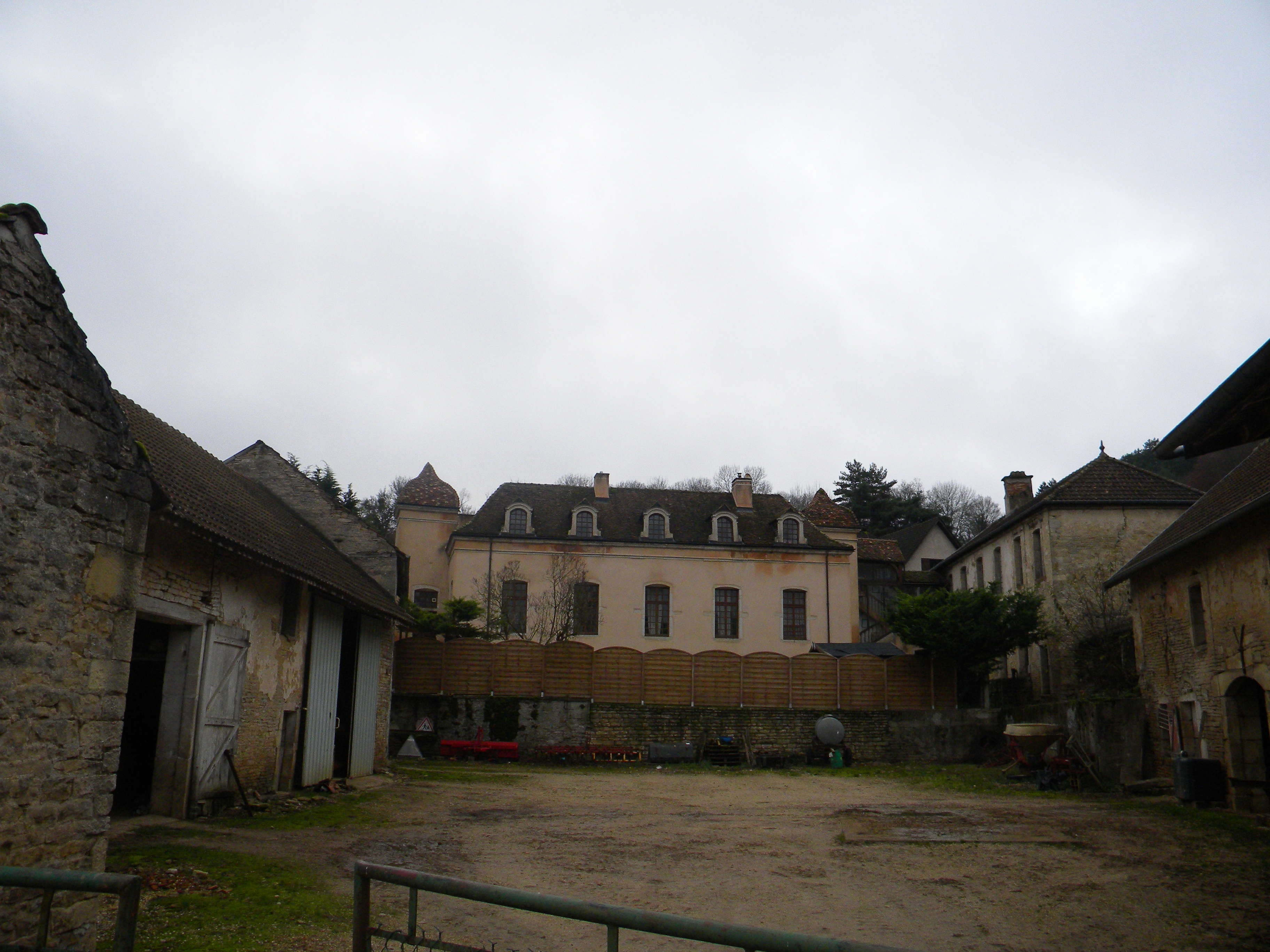 kastelo de Ternant